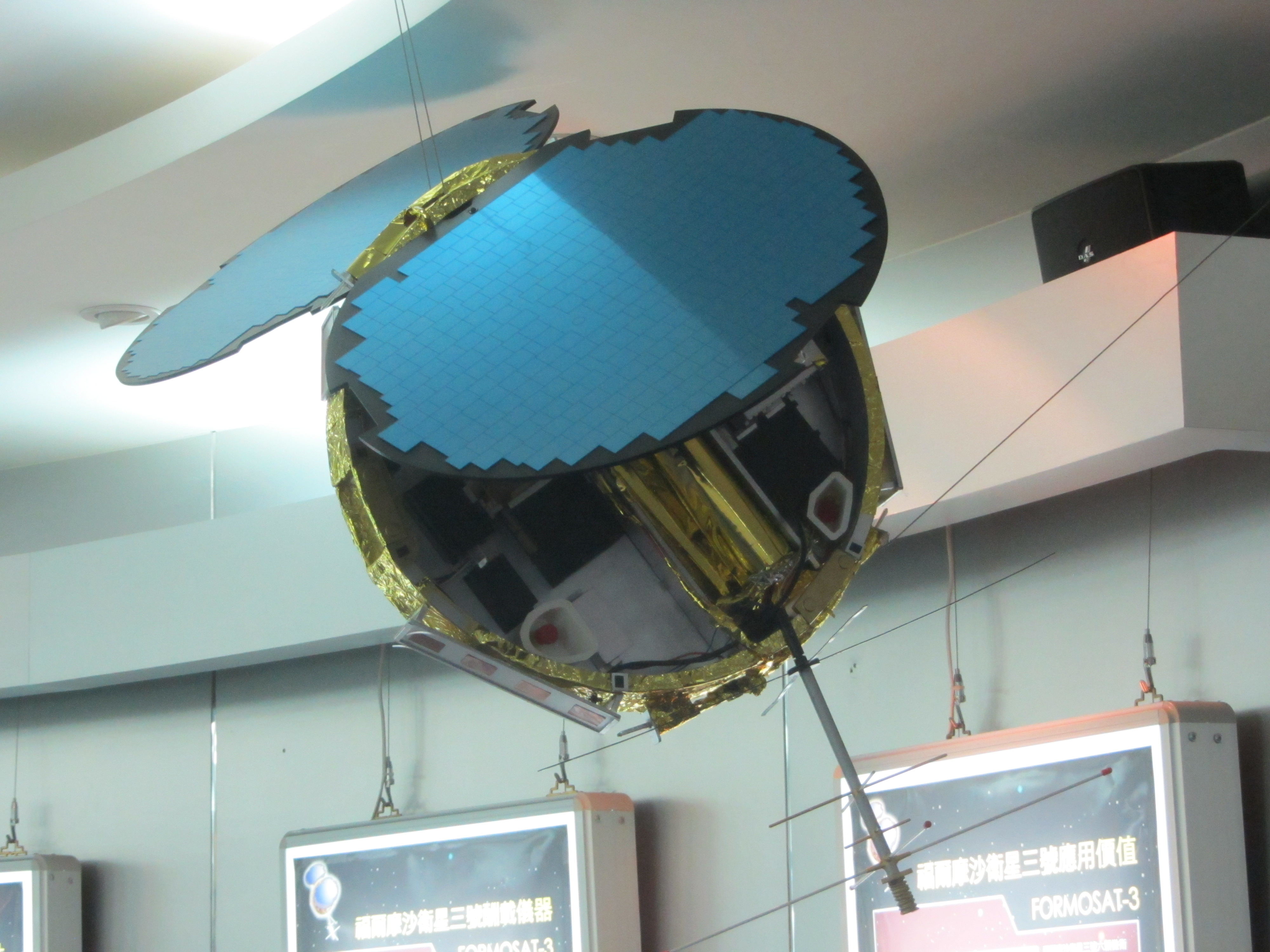 福爾摩沙衛星三號模型